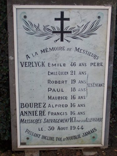 Stelle rue Verlyck à Hazebrouck, en souvenir du massacre du mercredi 30 août 1944.